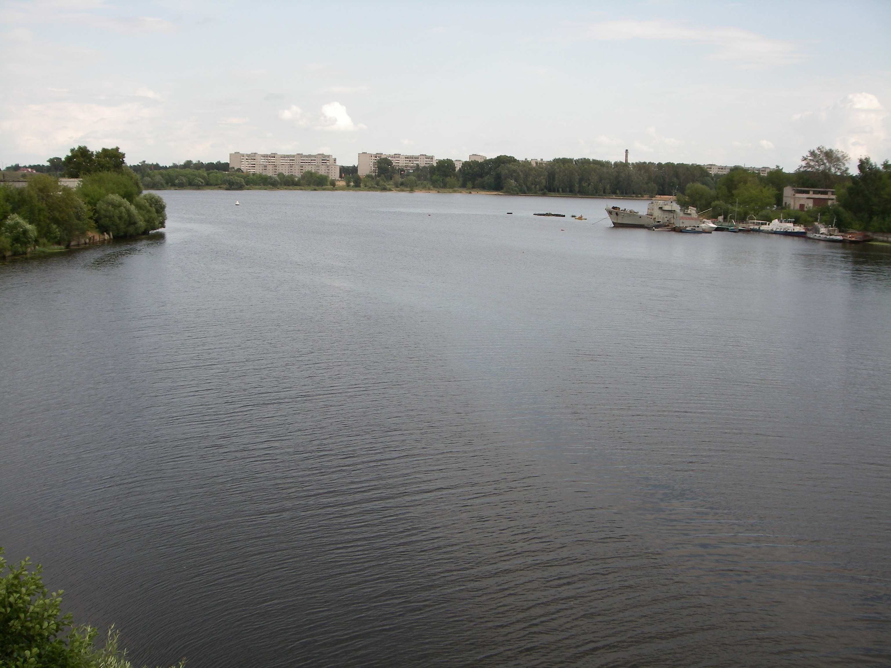 Rivero Volgo en la urbo Kimri en la Tverja provinco